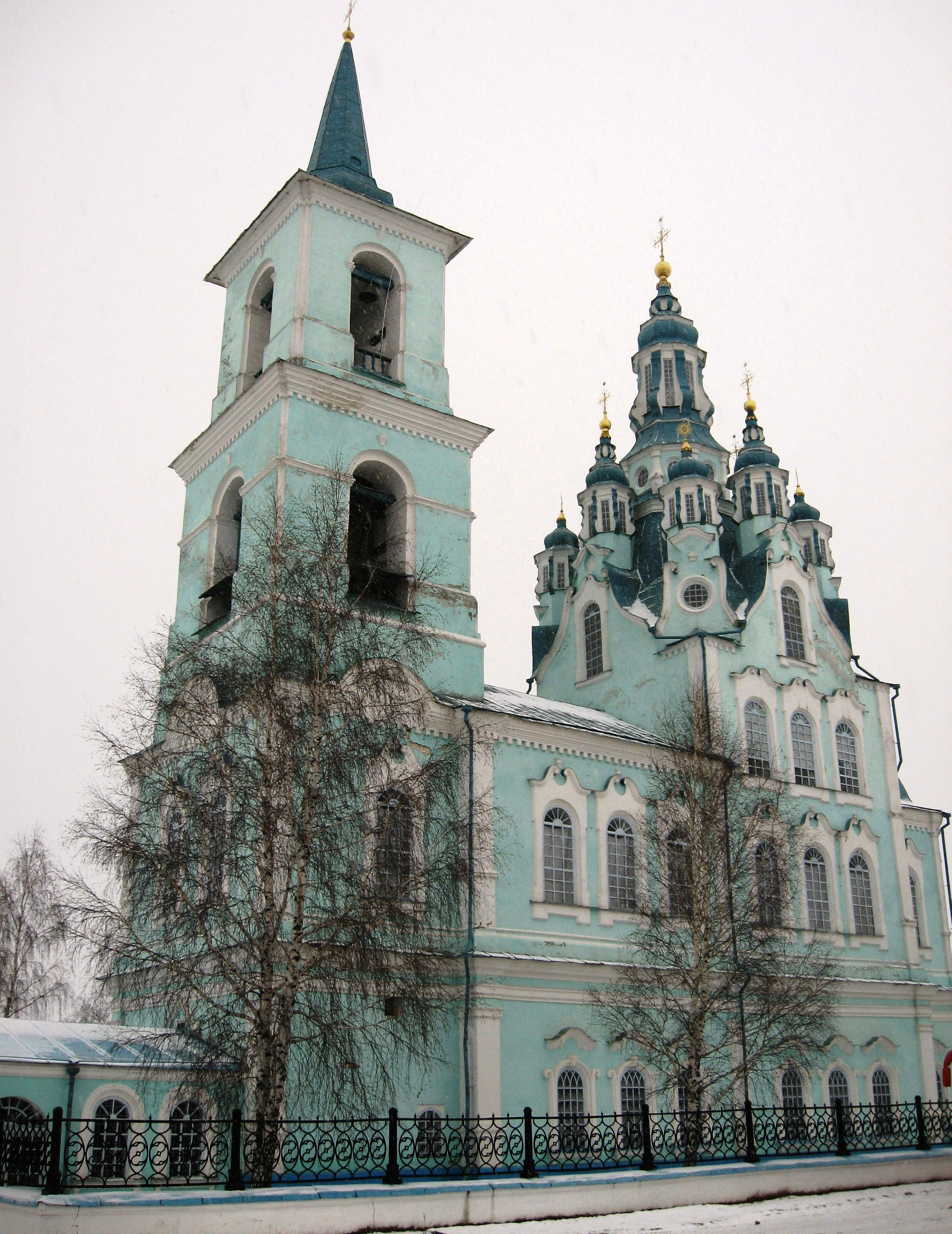 Церковь Спаса Преображения (Свердловская область, Алапаевск, село Нижняя Синячиха)